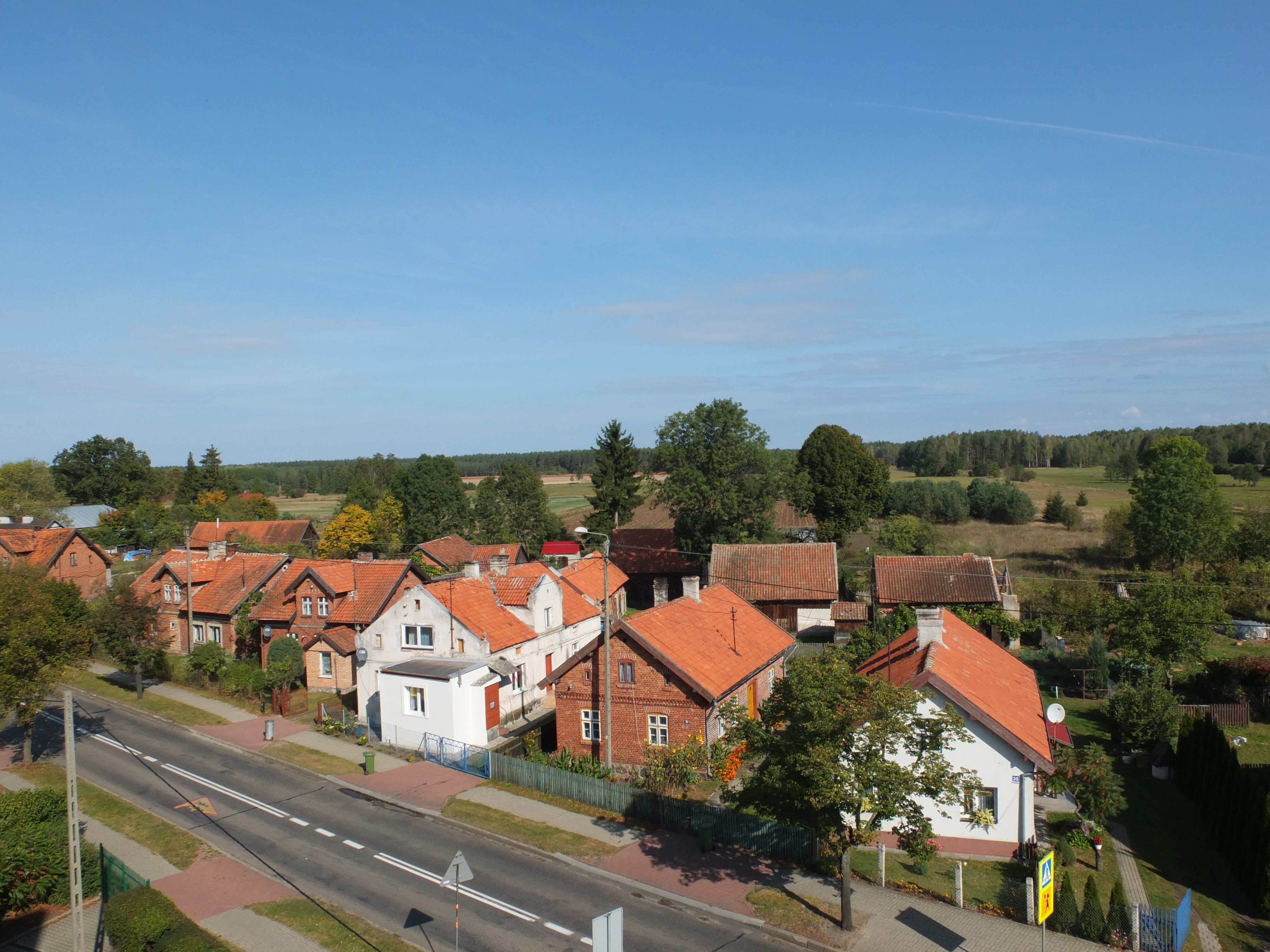 Olszyny - murowana zabudowa